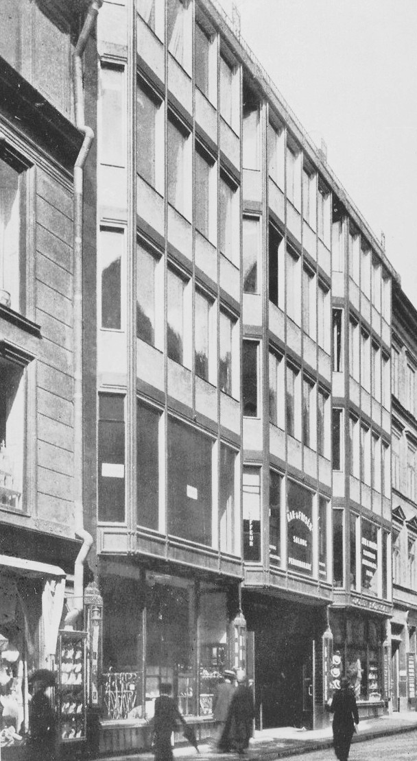 Felix Sachs hus, fasad Regeringsgatan 9